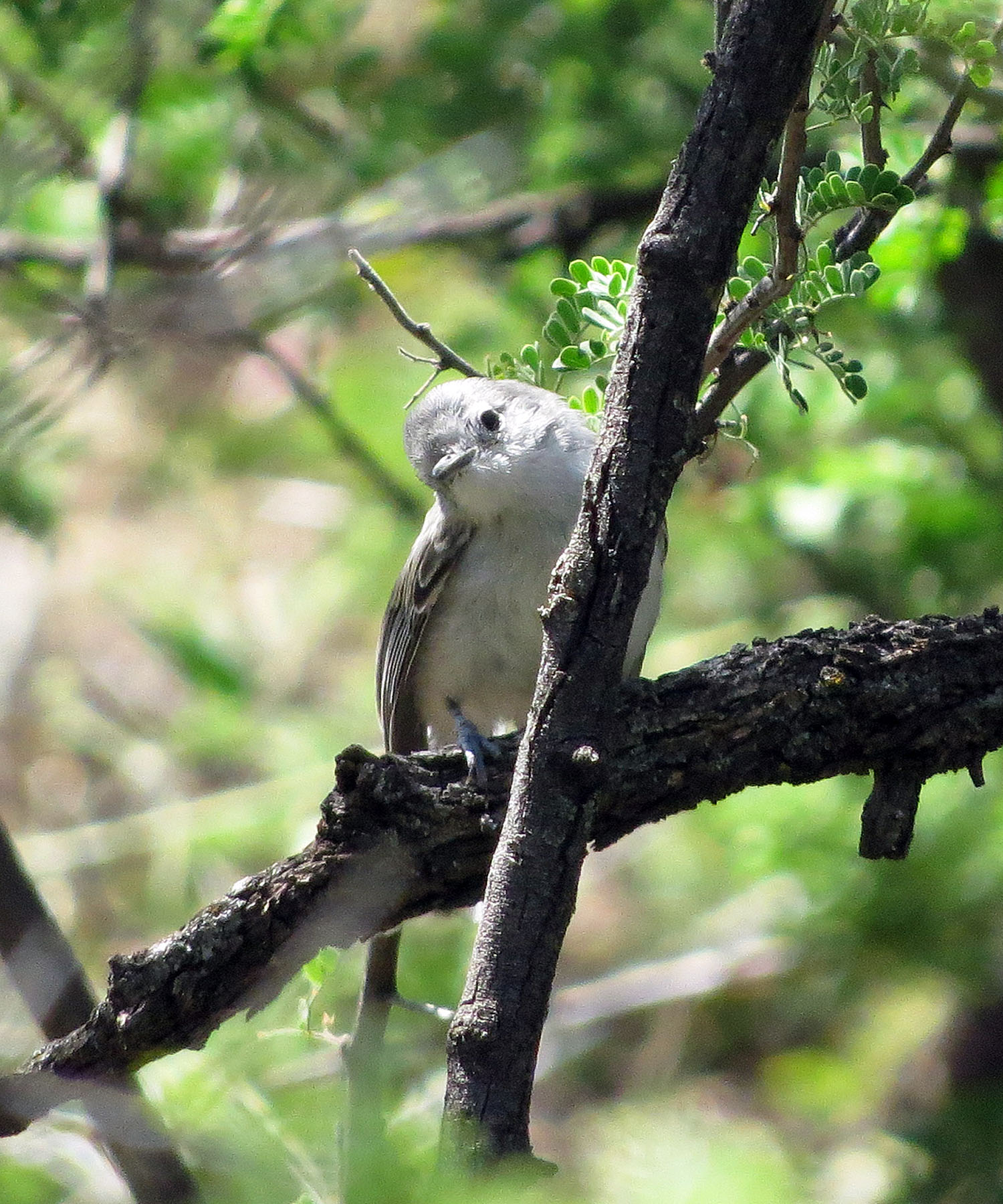 Polioptila nigriceps restricta 14 may 15 San Pedro House, AZ